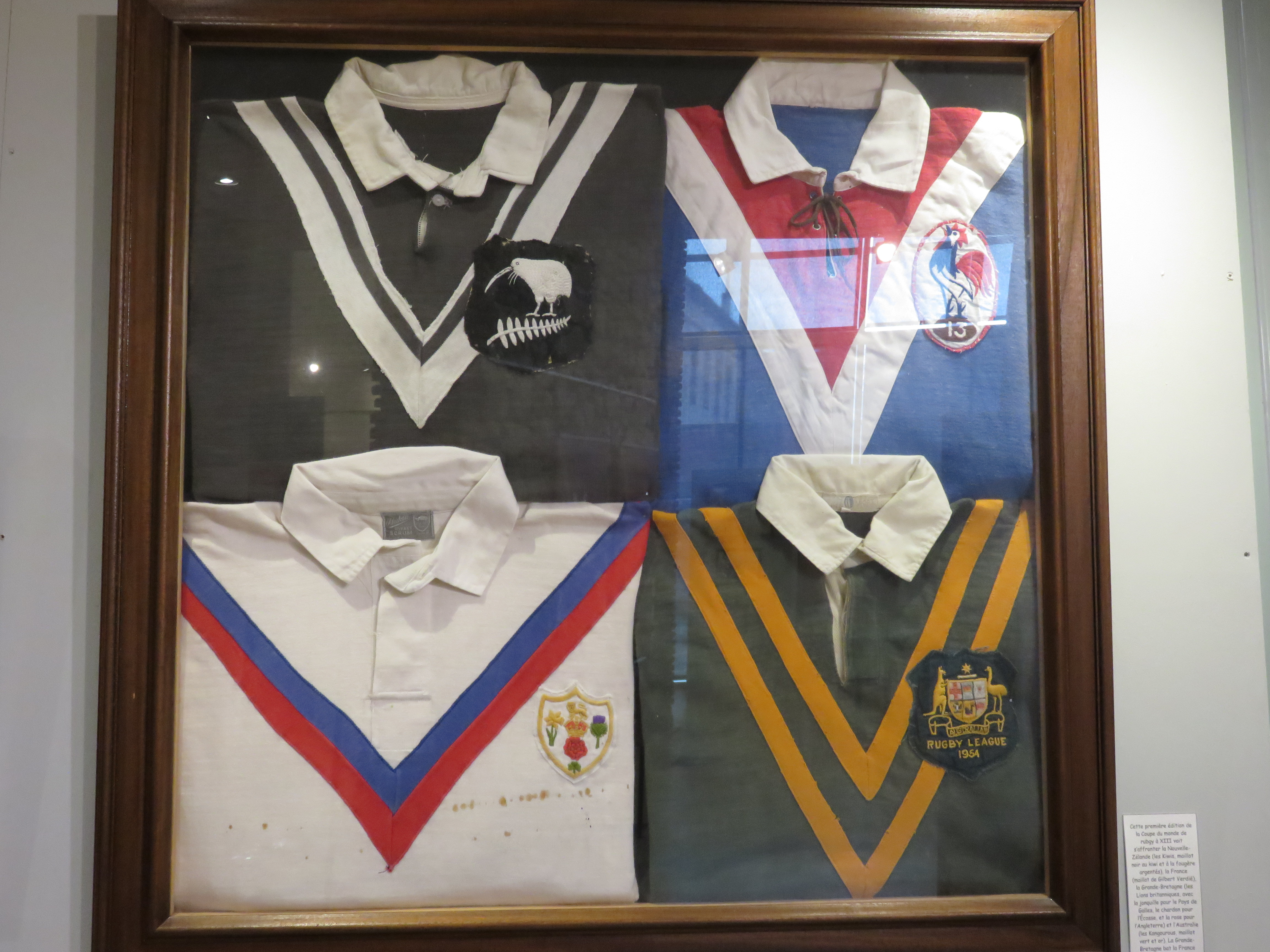 Maillots des quatre participants de la Coupe du monde de rugby à XIII 1954